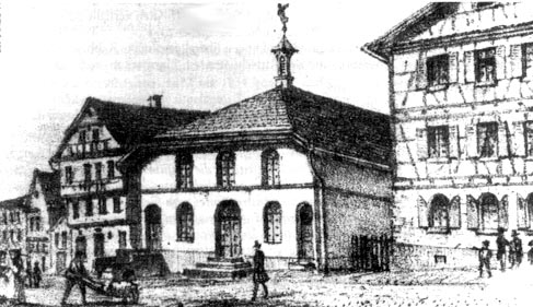 Ansicht der Synagoge in Hechingen (undatiert, zwischen 1852 und 1881); Lithographie von S. Obach, Städt. Museum Hechingen)